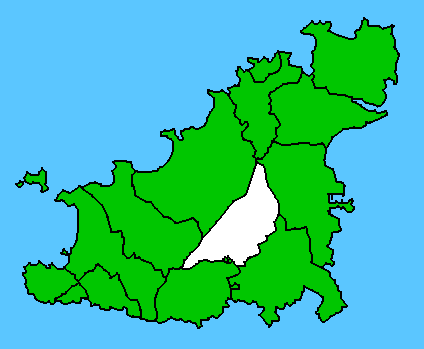 Carte des paroisses de Guernesey. Situation de la paroisse de St-André ( en blanc sur la carte).